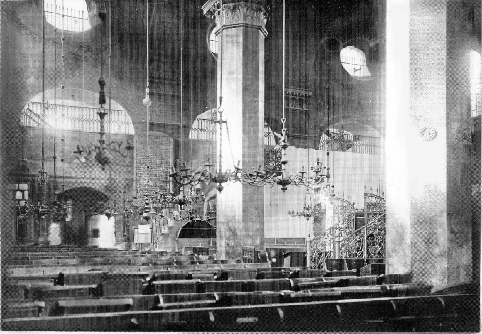 Wielka Synagoga Przedmiejska